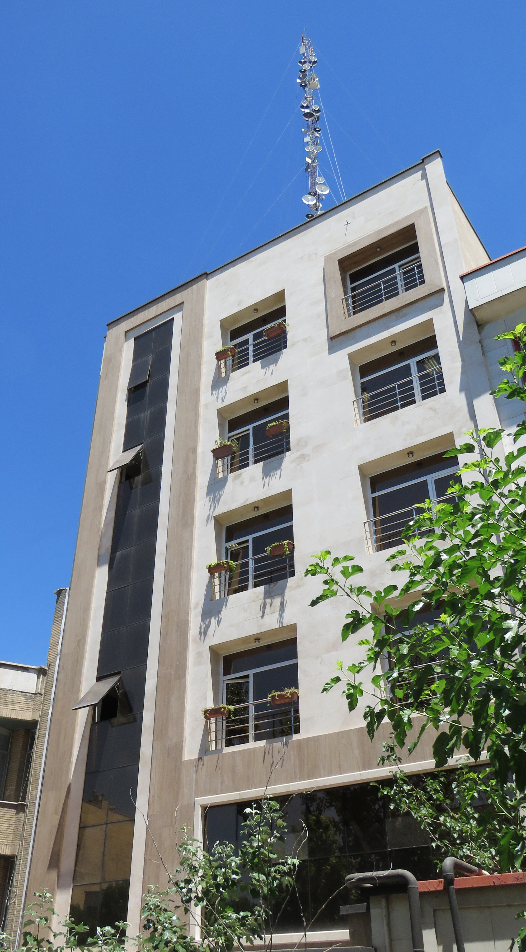 ساختمان دفتر مرکزی رسپینا